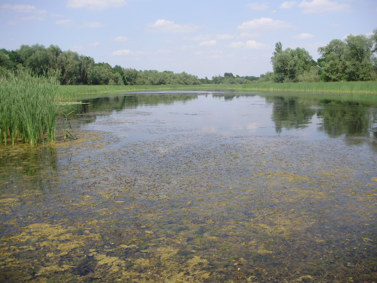 Srpski (latinica): Ово је фотографија заштићеног природног добра у Србији под шифром: РП18 This is a a photo of a natural area in Serbia with ID: РП18 Reka Zasavica, zajedno sa obalom.